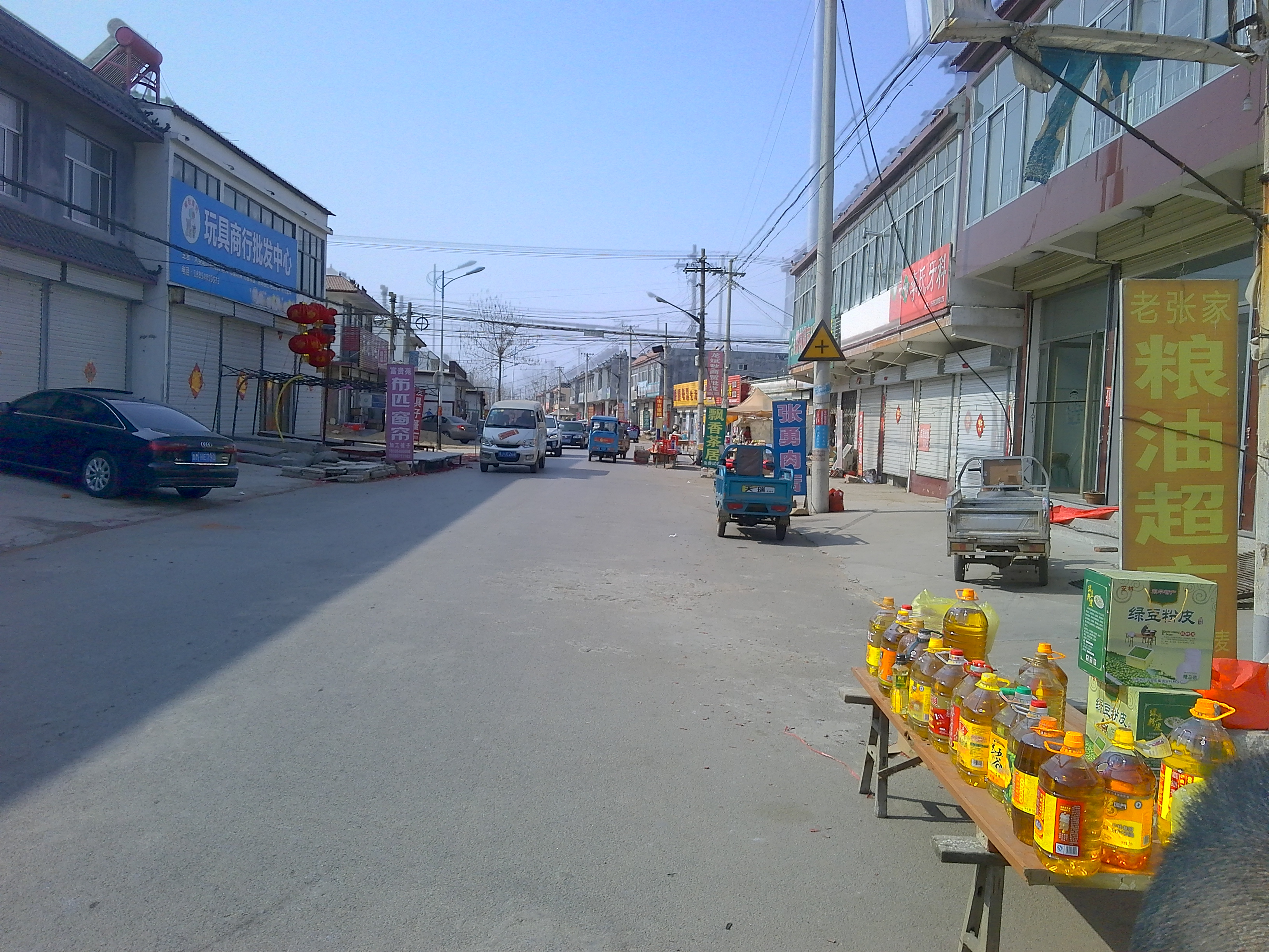 东平县州城街道西梁村